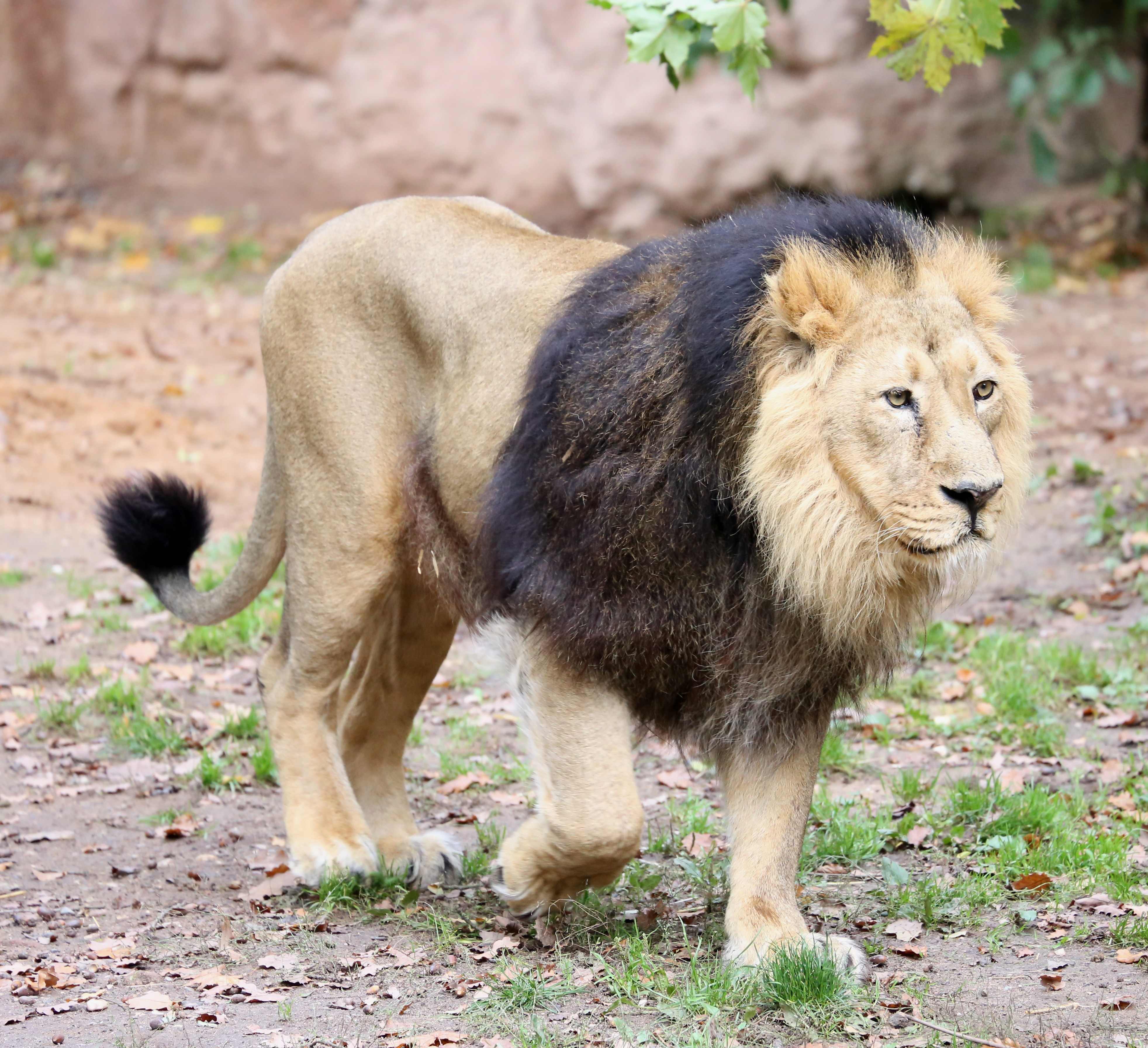 Asiatischer Löwe (Panthera leo persica), Tiergarten Nürnberg